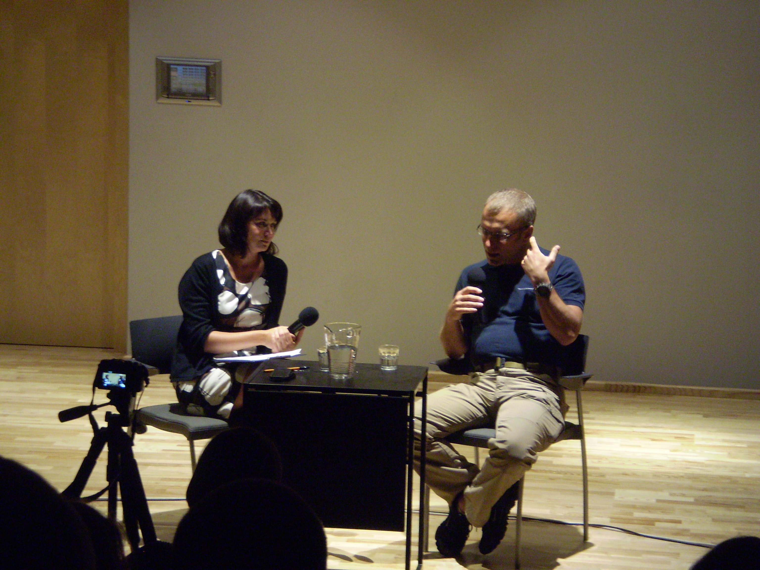 Rozmowa Olgi Woźniak z dr Piotrem Durką podczas pierwszego spotkania w ramach kina Centrum Nauki "Kopernik" w Warszawie